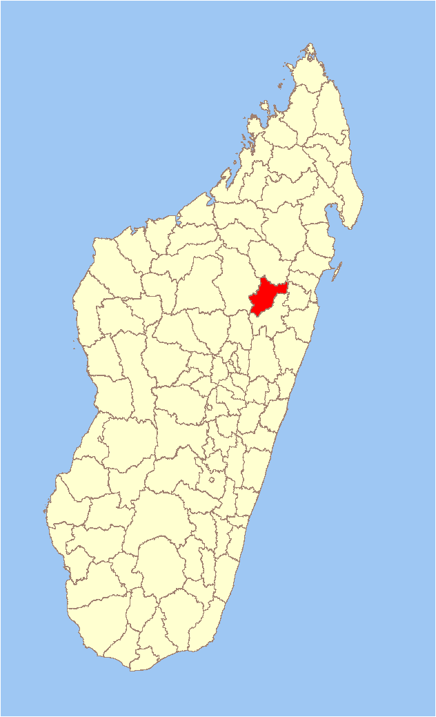 Map of Amparafaravola district